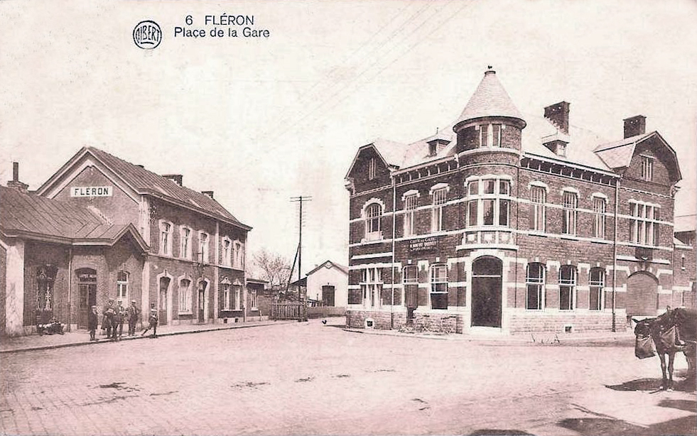 La place de la gare de Féron en Belgique, avec le bâtiment voyageurs de la gare à gauche, la halle à marchandise en arrière plan et un immeuble à droite. En 2019 seul le bâtiment voyageurs de la gare a disparu, remplacé par un parking.